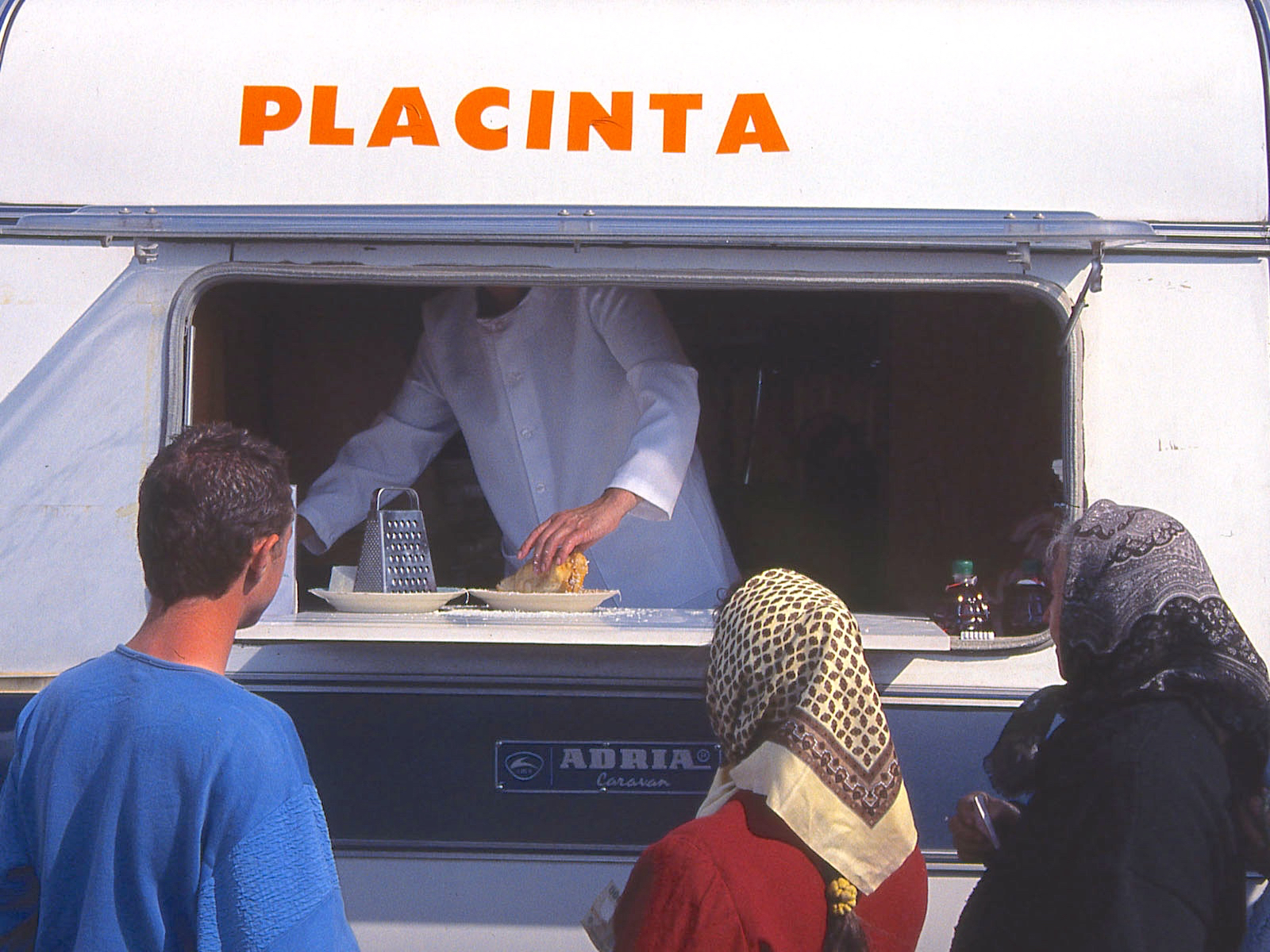 Placinta stall on the market in Hodod, Romania